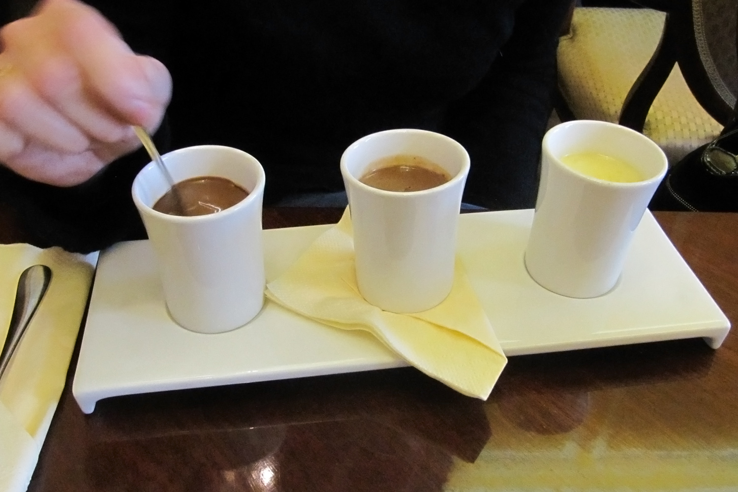 Trinkschokoladen-Auswahl von Wedel